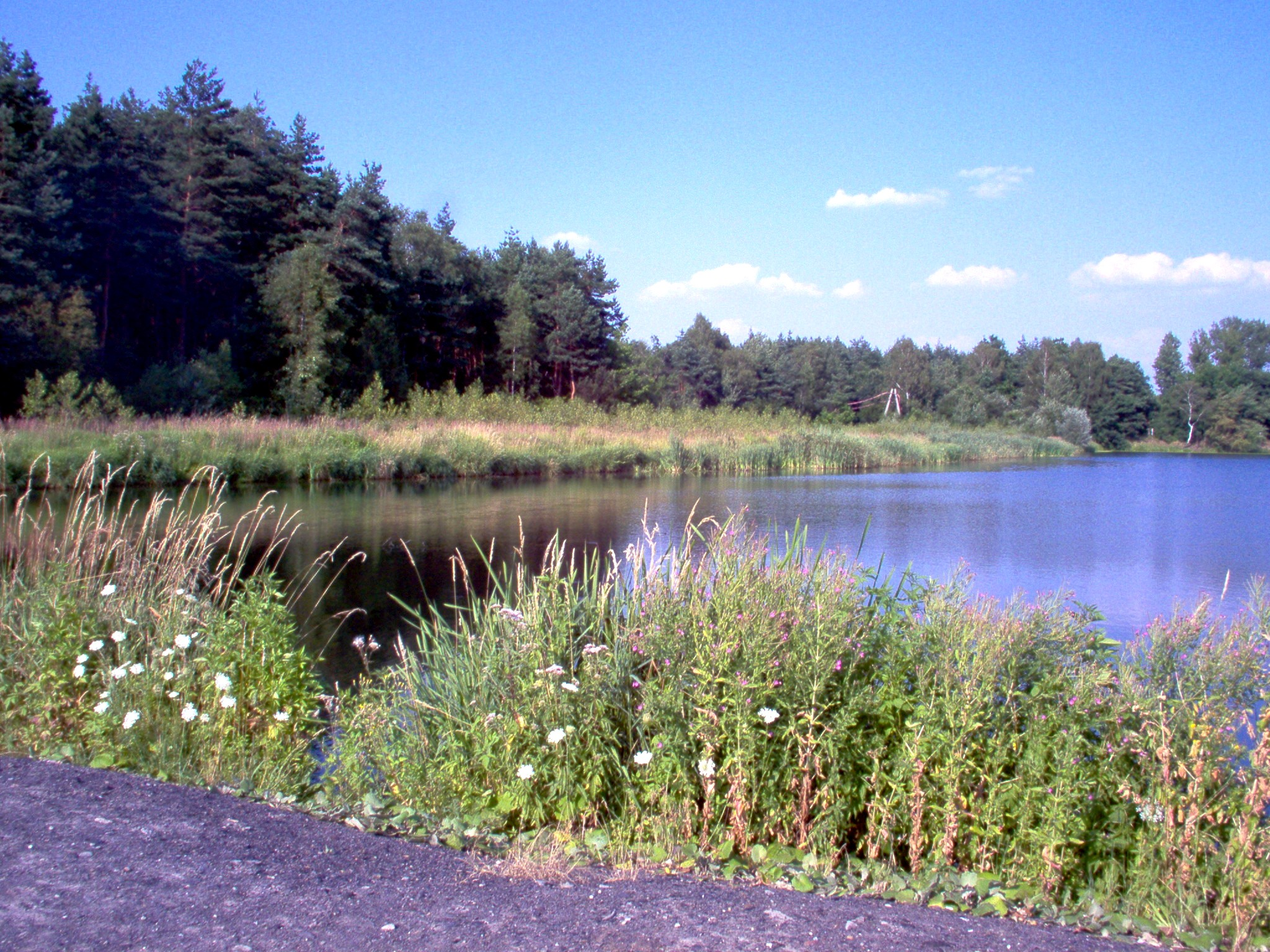 Bolina zbiornik wodny w Katowicach -Janowie blisko ulicy Leśnego Potoku.Zdjęcie z 22 lipca 2006 r.